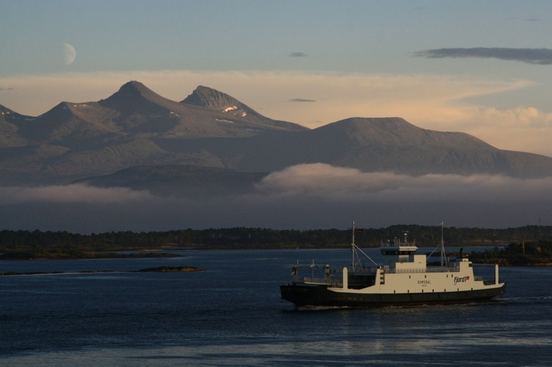 Fjord1 MRF si ferje M/F Romsdal utanfor Molde